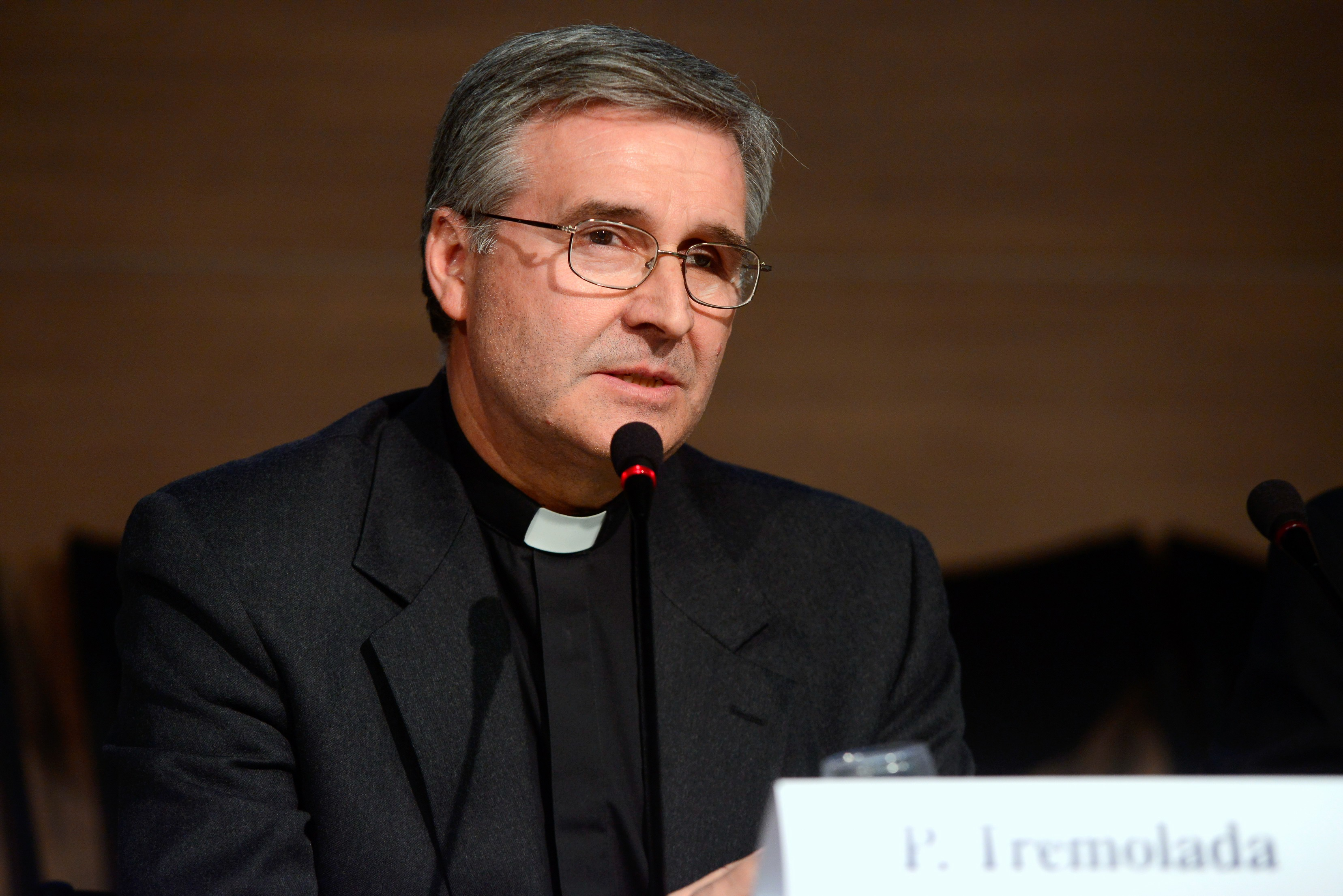 mons. Pierantonio Tremolada